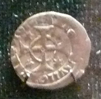 Denár Bély IV.